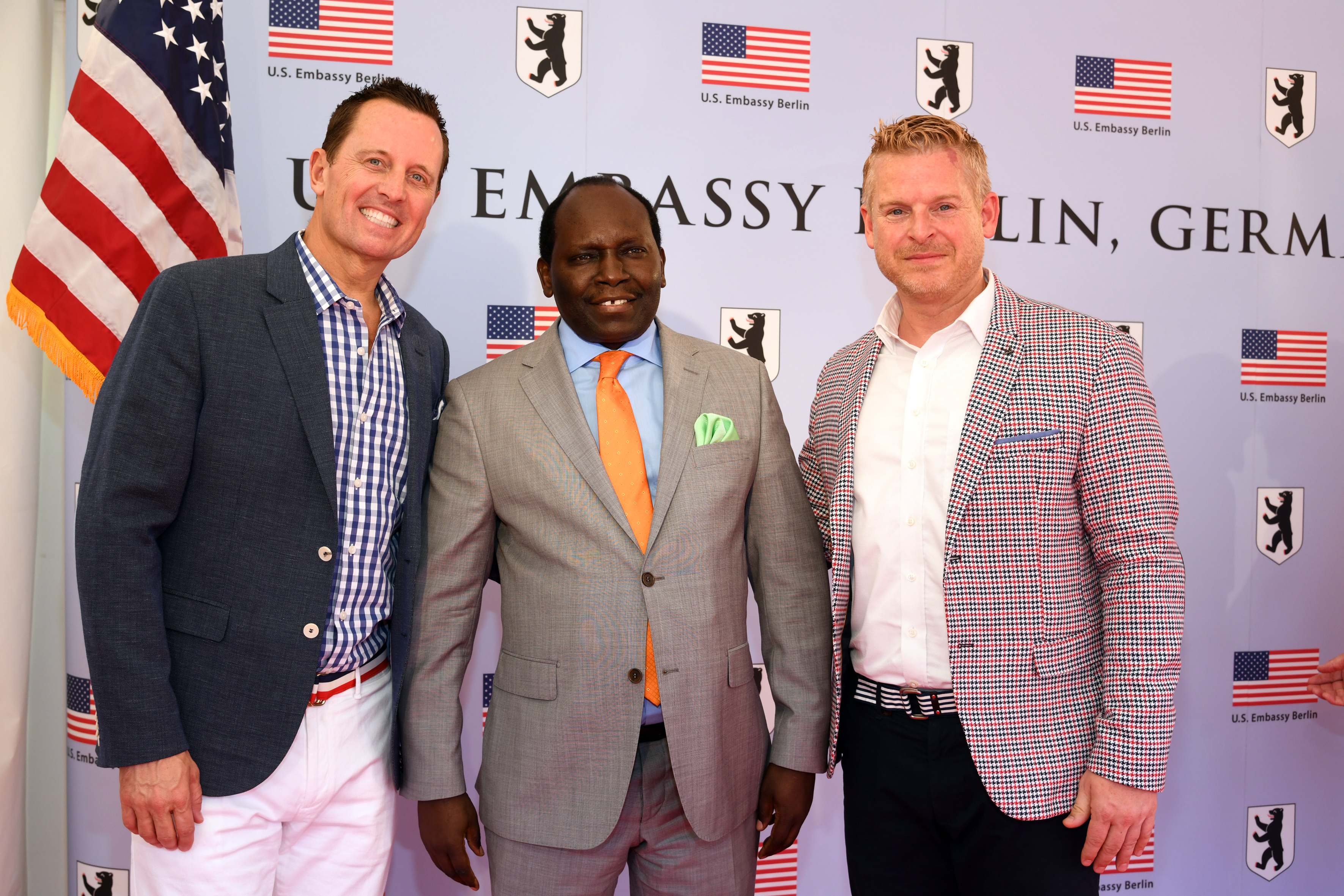 Richard Grenell, Joseph Magutt & Matt Lashey, Sommerfest der US Botschaft Berlin, 4th of July 2018